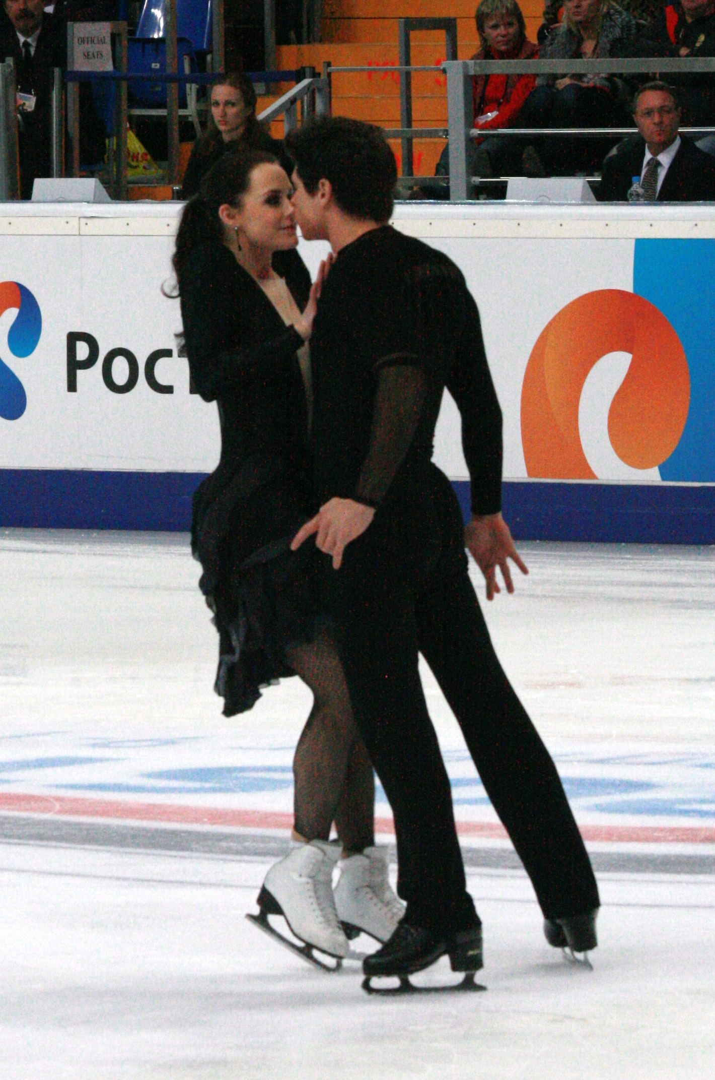 Тесса Виртью и Скотт Моир (Канада) на Кубке Ростелекома 2012. Произвольная программа.